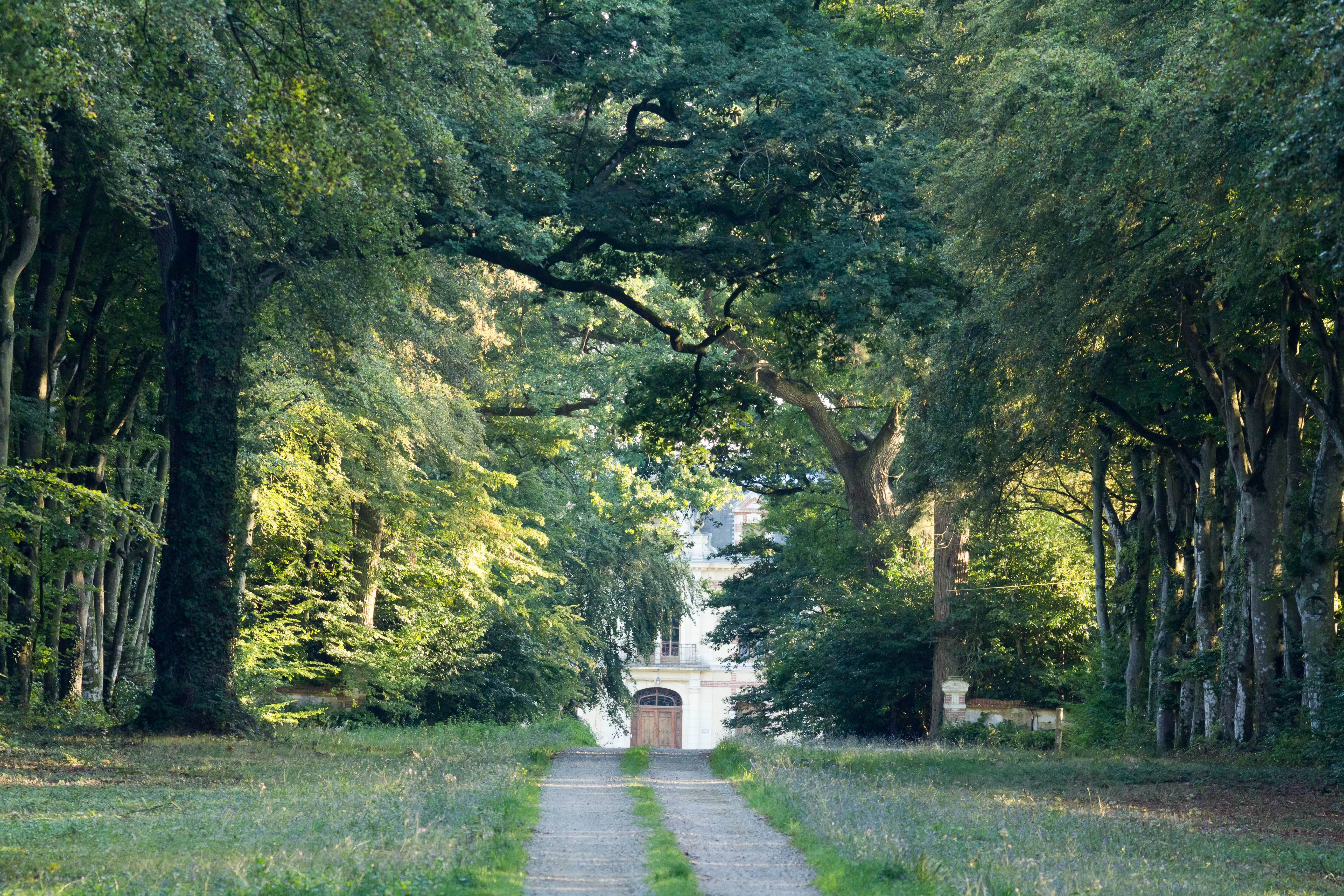 Château de la Haichois dissimulé par les arbres, à Mordelles. .